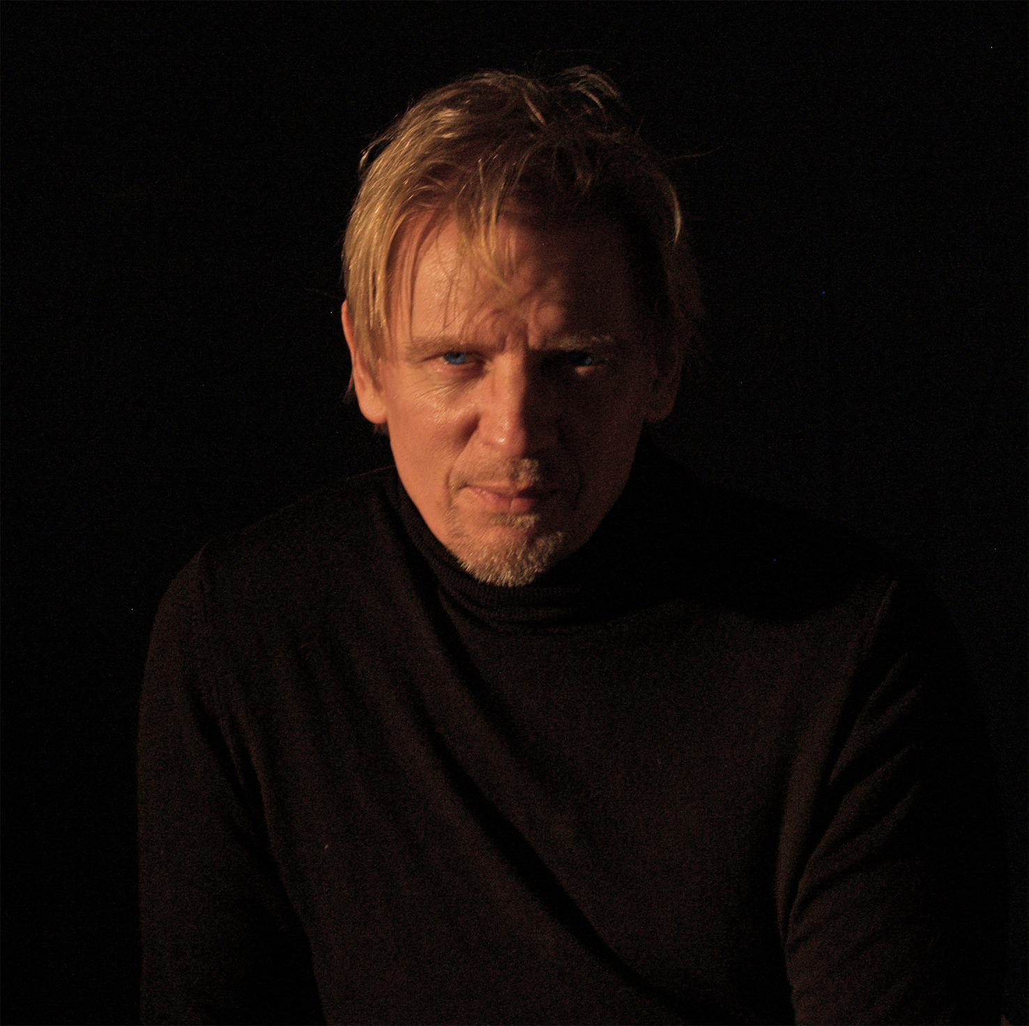 Johan Ferner Ström. Photo: Juanito Clauson